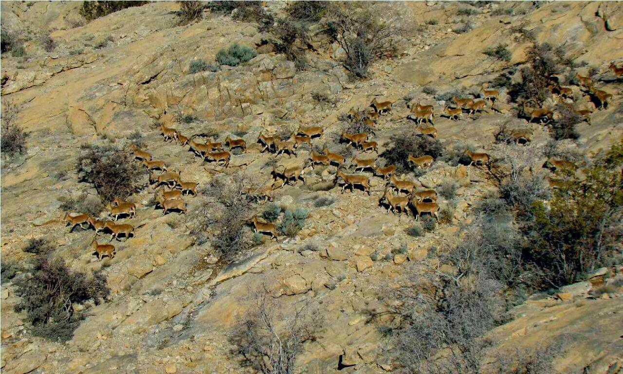 حیات وحش پارک ملی خَبر (عکس از مکی آبادی)